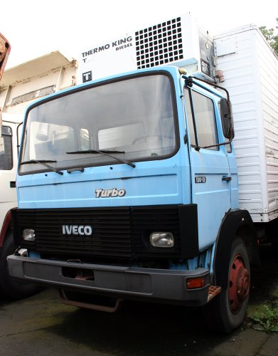 IVECO Kühlwagen